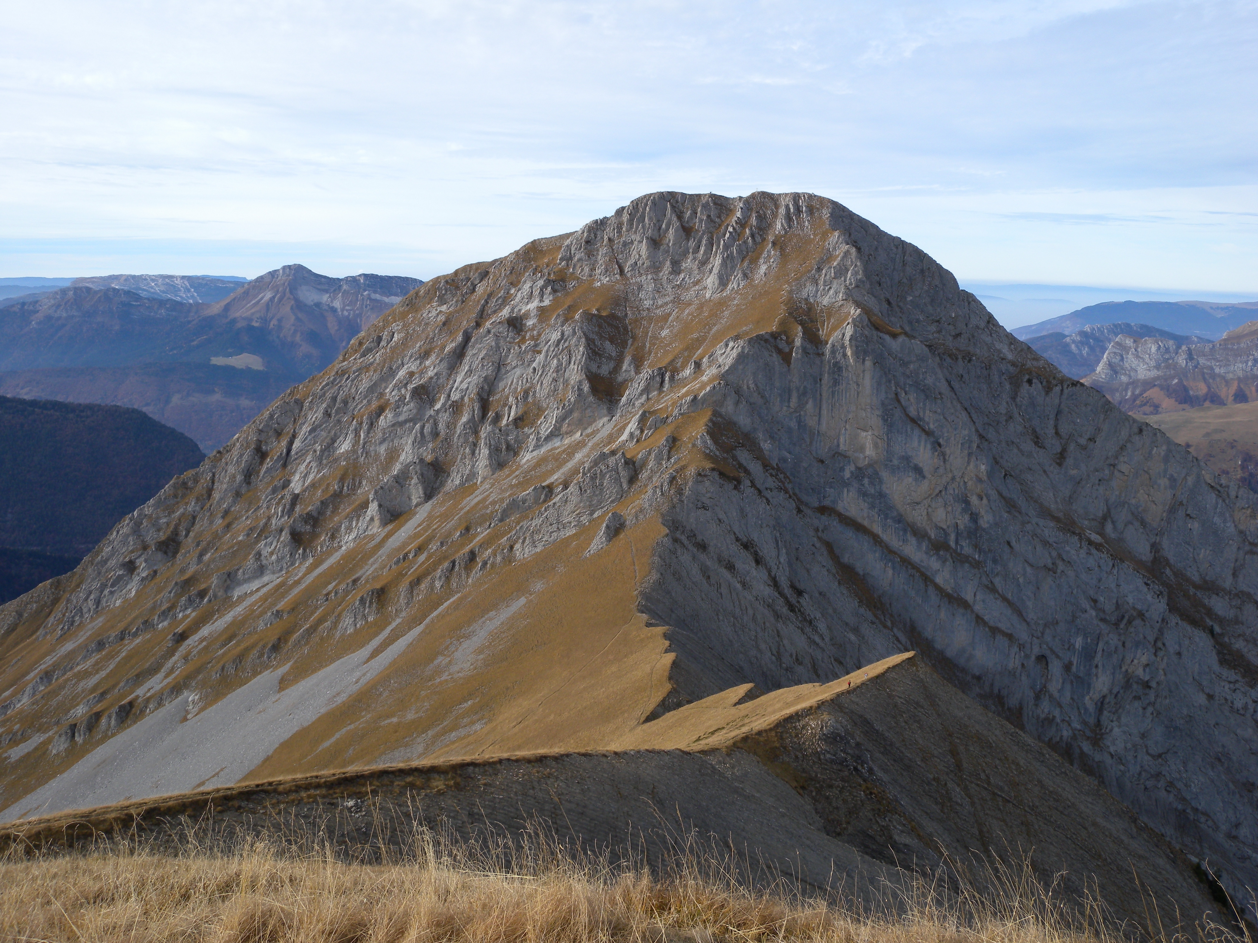 Mont Pécloz (2197m)